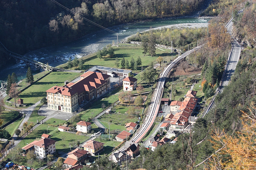 funghera